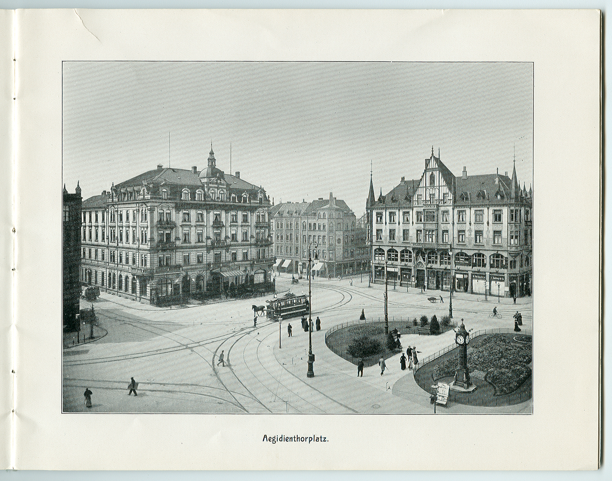 „Hannover – 26 Ansichten nach künstlerischen Aufnahmen“ von Karl F. Wunder. – Aegidienthorplatz.